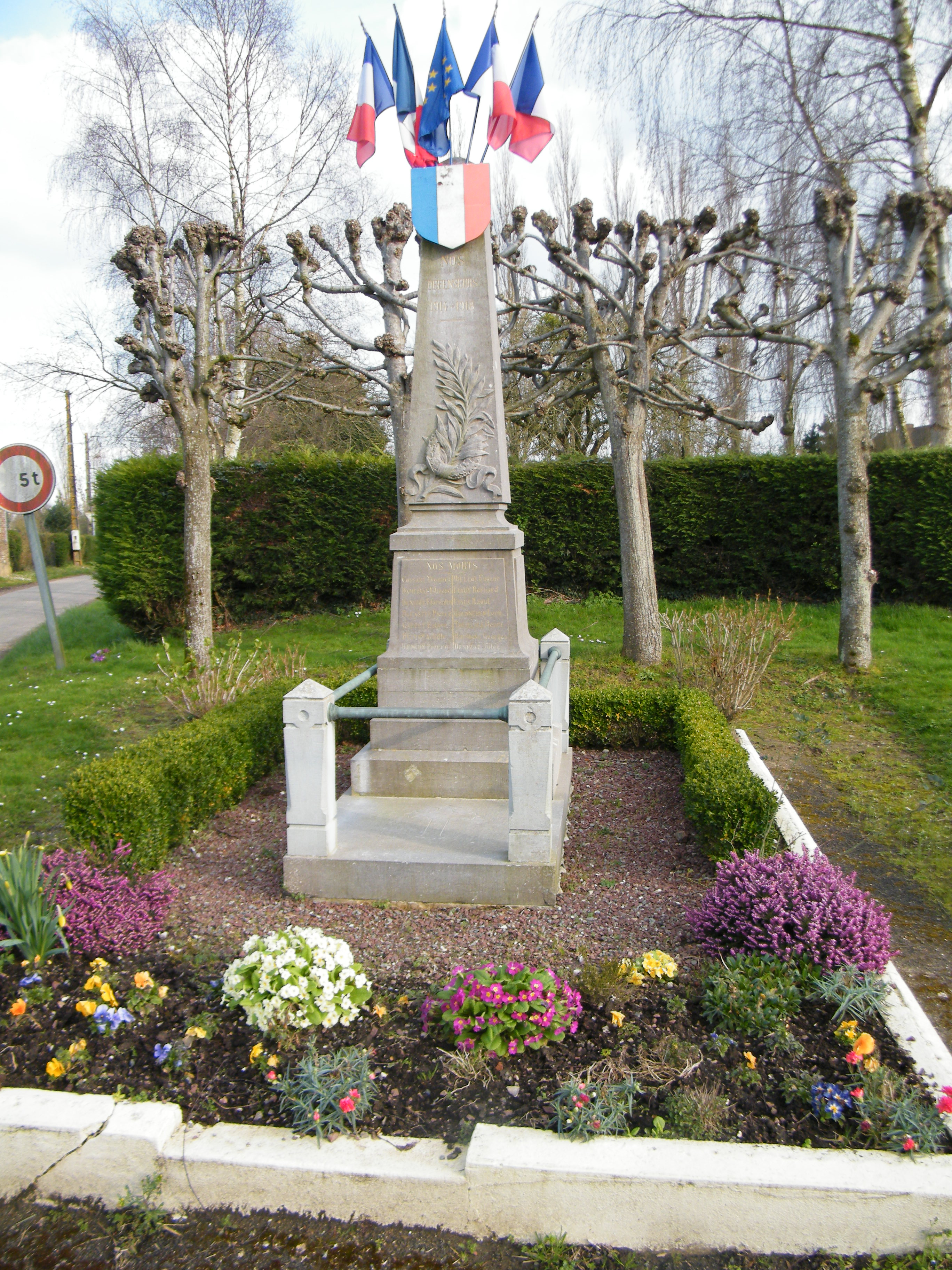 le monument aux morts pour la patrie.